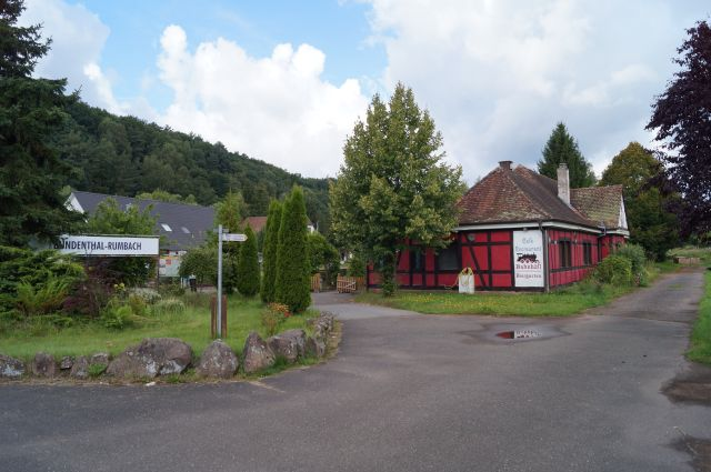 Bahnhof Bundenthal-Rumbach (Pfalz)